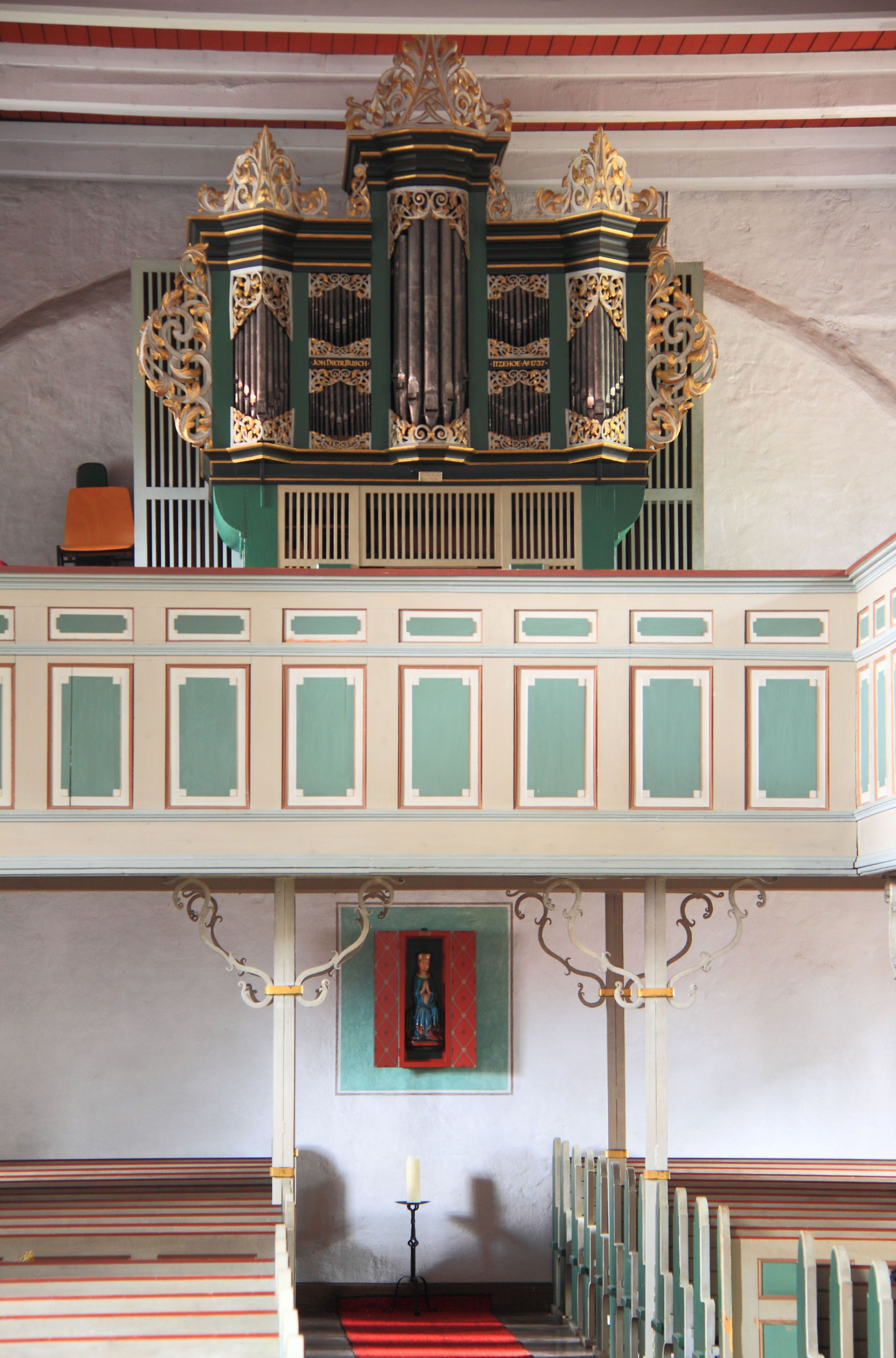 Orgel in Wardenburg, Oldenburg, Niedersachsen